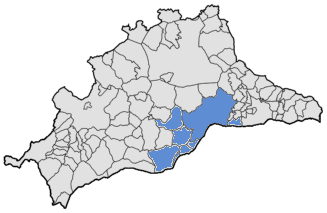 Área metropolitana de Málaga, constituído por los municipios de Málaga, Mijas, Fuengirola, Torremolinos, Benalmádena, Rincón de la Victoria, Alhaurín de la Torre y Cártama. Ministerio de Fomento, 2013.